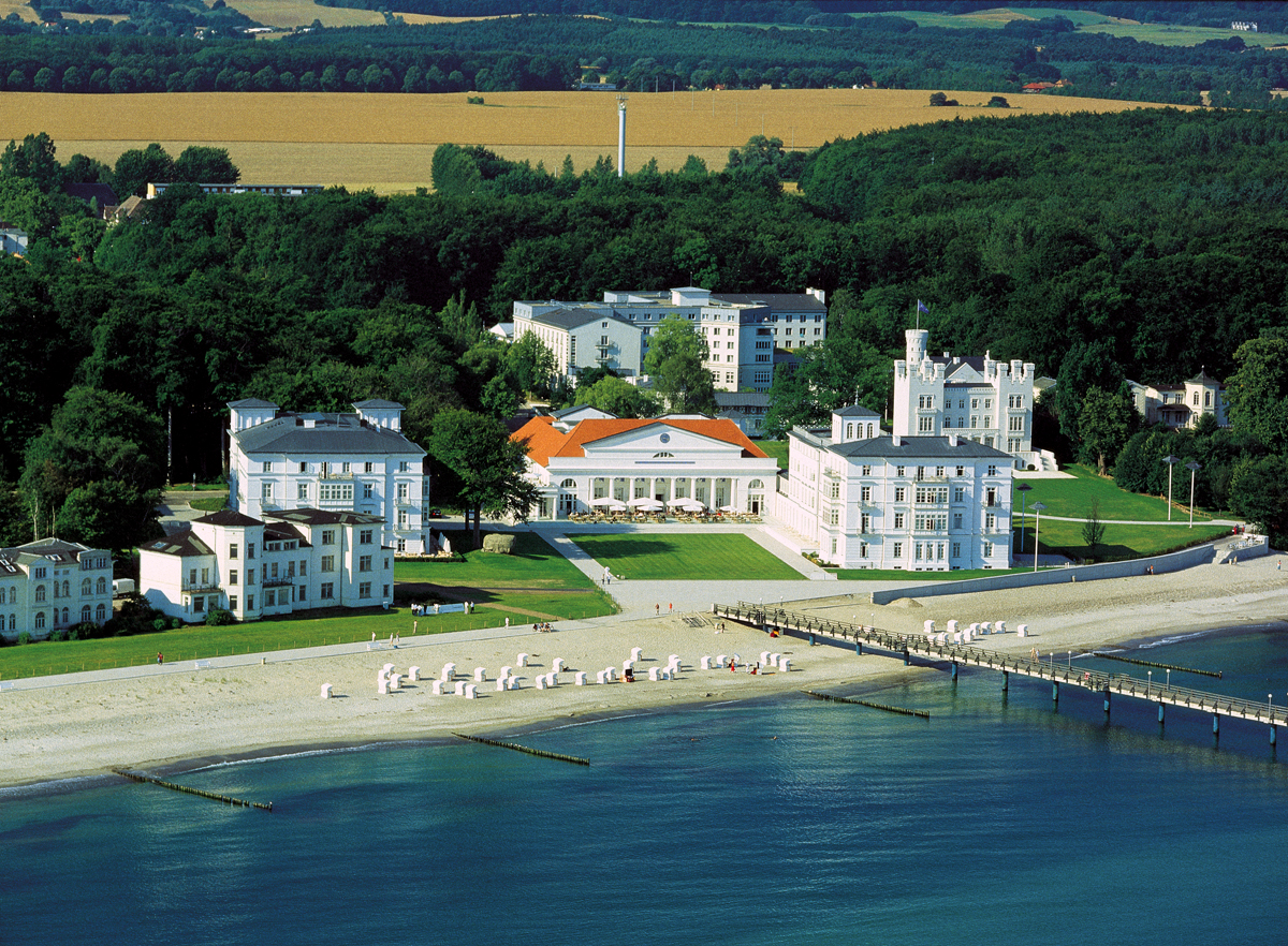 Heiligendamm